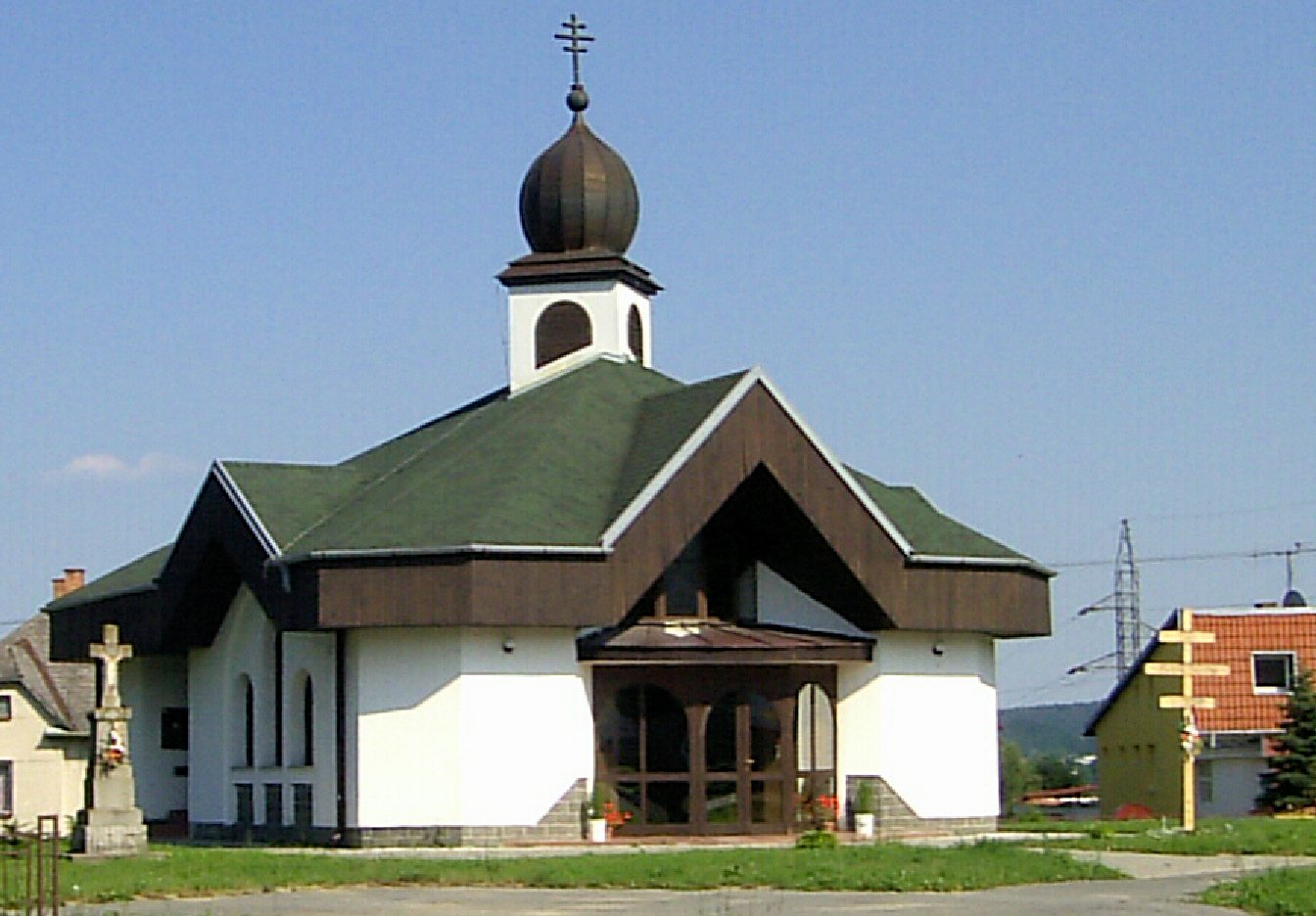 Gréckokatolícky kostol Majerovce